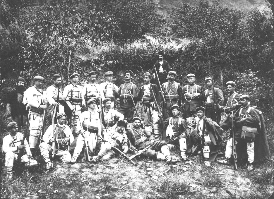 Cheta of Yordan Spasov and Petar Yurukov